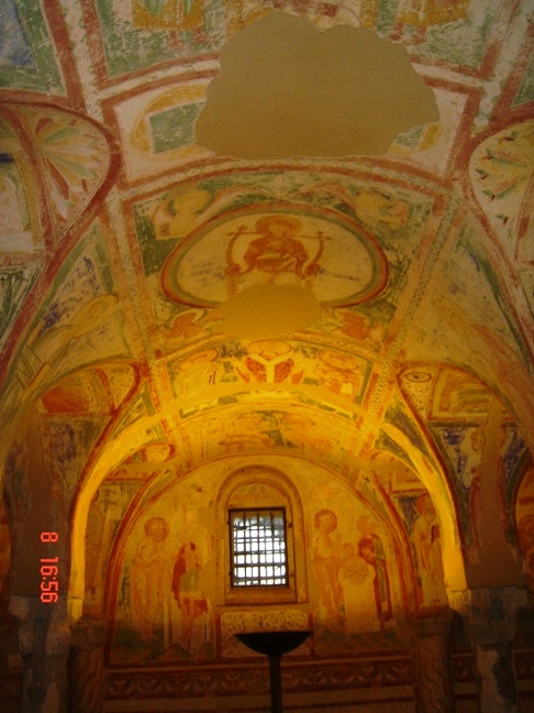 Basilica patriarcale di Aquileia - Cripta degli affreschi